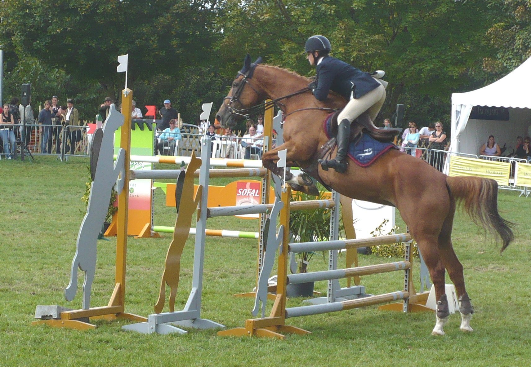 saut d'une barre de spa en concours à Surgères en France en 2007